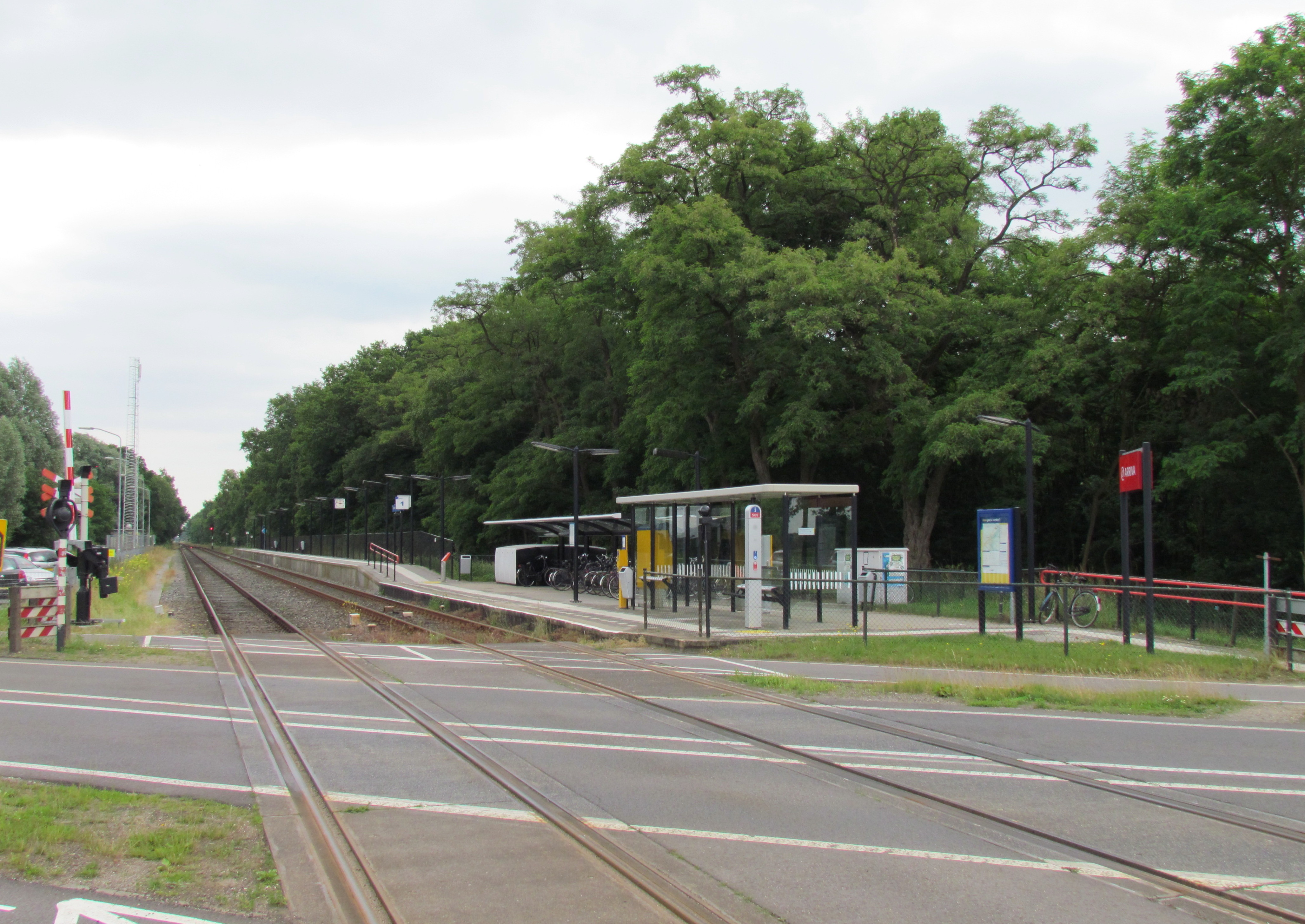 Station Klarenbeek (Arriva), Klarenbeek, NL